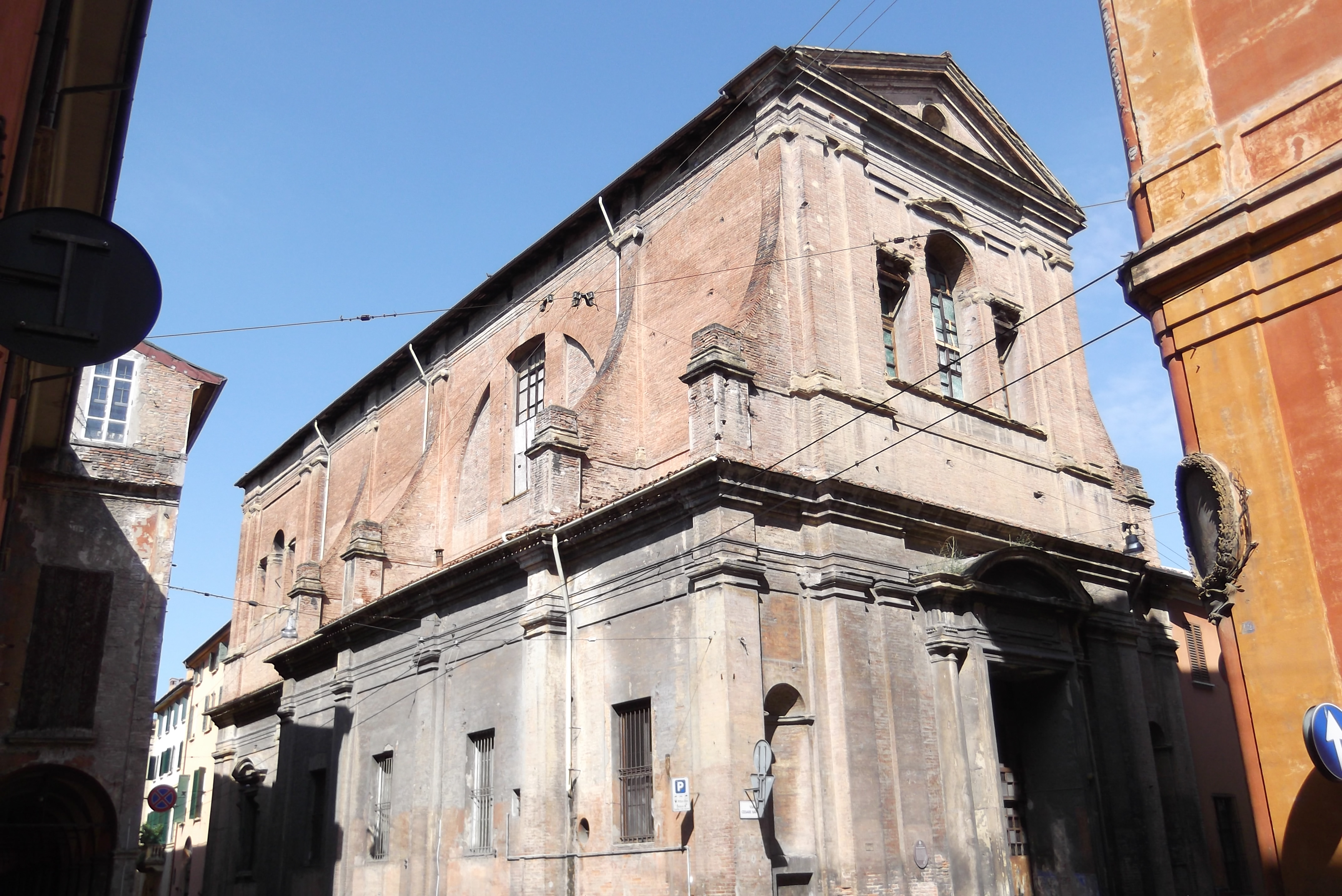 Ex chiesa di San Barbaziano, Bologna, Italy